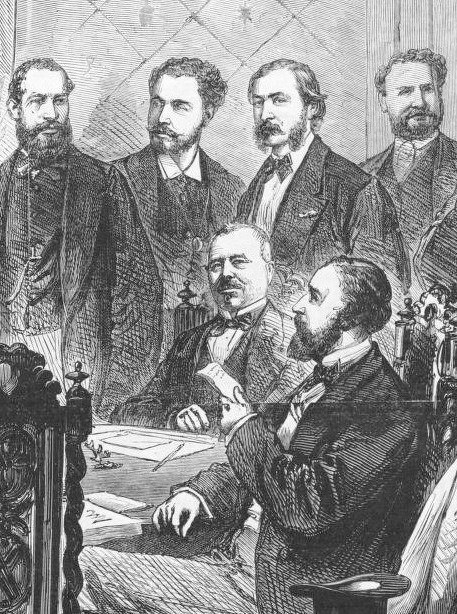 Détail de Séance de l'Union parisienne de la Presse, dans laquelle fut décidée la liste des candidats à l'élection du 2 juillet 1871. De gauche à droite : Hervé (Journal de Paris), Tarbé (Gaulois), Gibiat (Constitutionnel, Pays), Dalloz (Moniteur universel, Petit Moniteur, Petite Presse, Monde illustré), Laurières Thémines (Patrie) et Jenty (France).